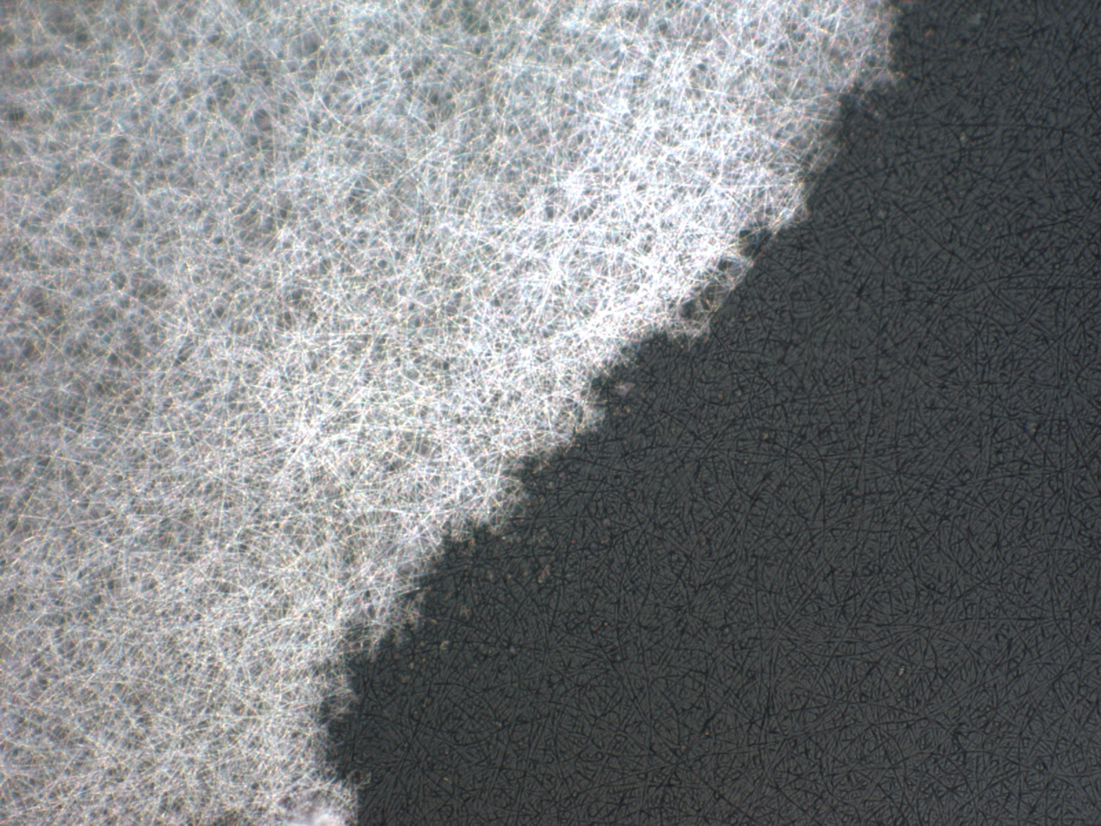 Epoxy resin impregnates electrospun polyvinyl alcohol fibres